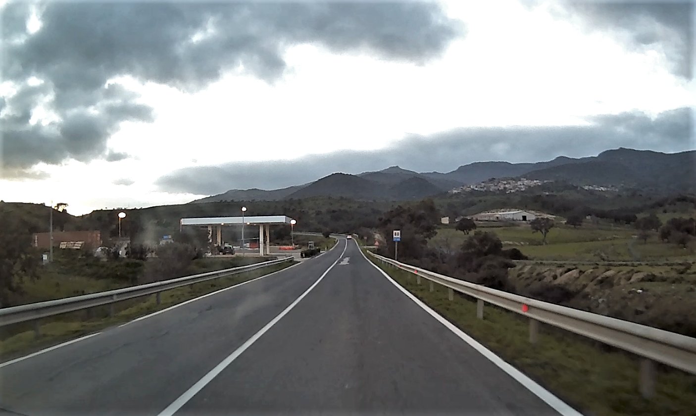 Strada statale 129 Trasversale Sarda presso il paese Lei